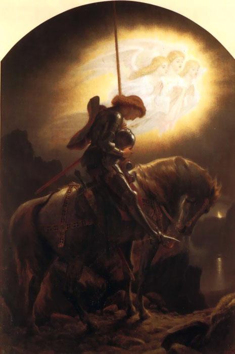 Galahad